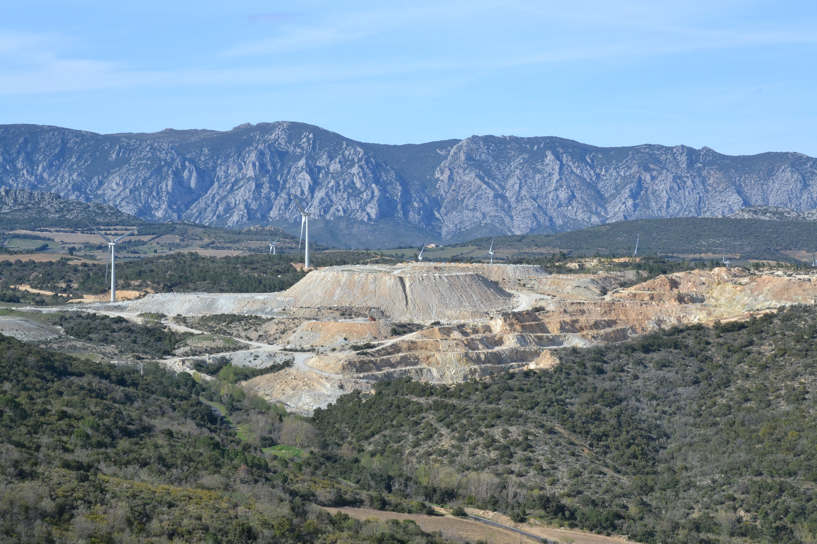 Carrière de feldspath de Lansac (Pyrénées-Orientales, France).